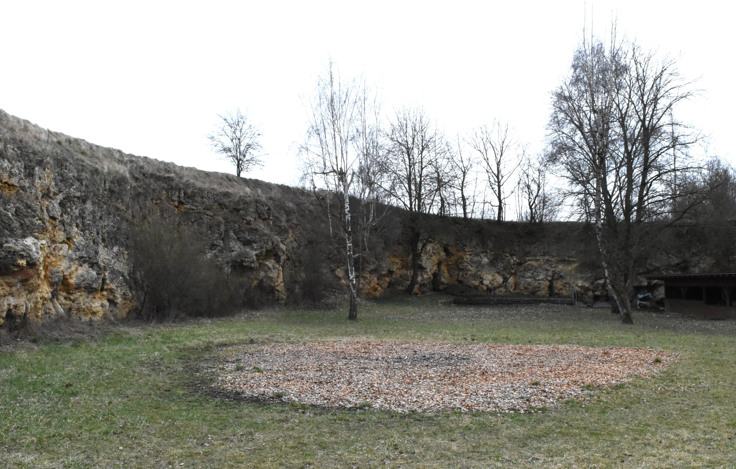 Hainsfarth Ries-See-Kalke